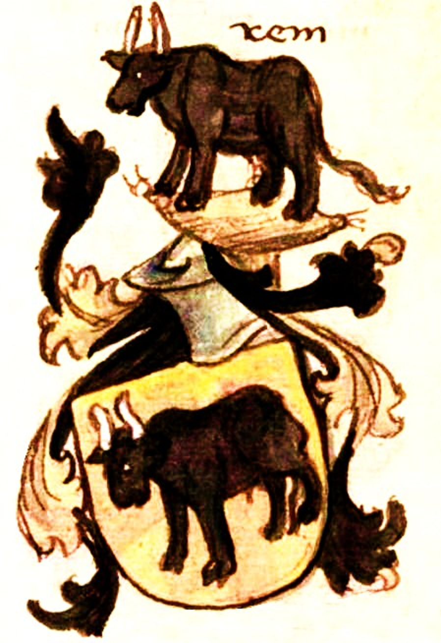 Wappen der Rem (Rehm), Augsburger Kaufmanns- und Patrizierfamilie; 1282 bis ins 18. Jahrhundert in Augsburg nachweisbar; vor 1317 Patriziat; 1368 Übertritt zu den Zünften; Herrenstube (Stubenzettel 1416); 1538 Wiederaufnahme ins Patriziat. Zuerst fassbar mit Hermann Rehm (1282–1295).